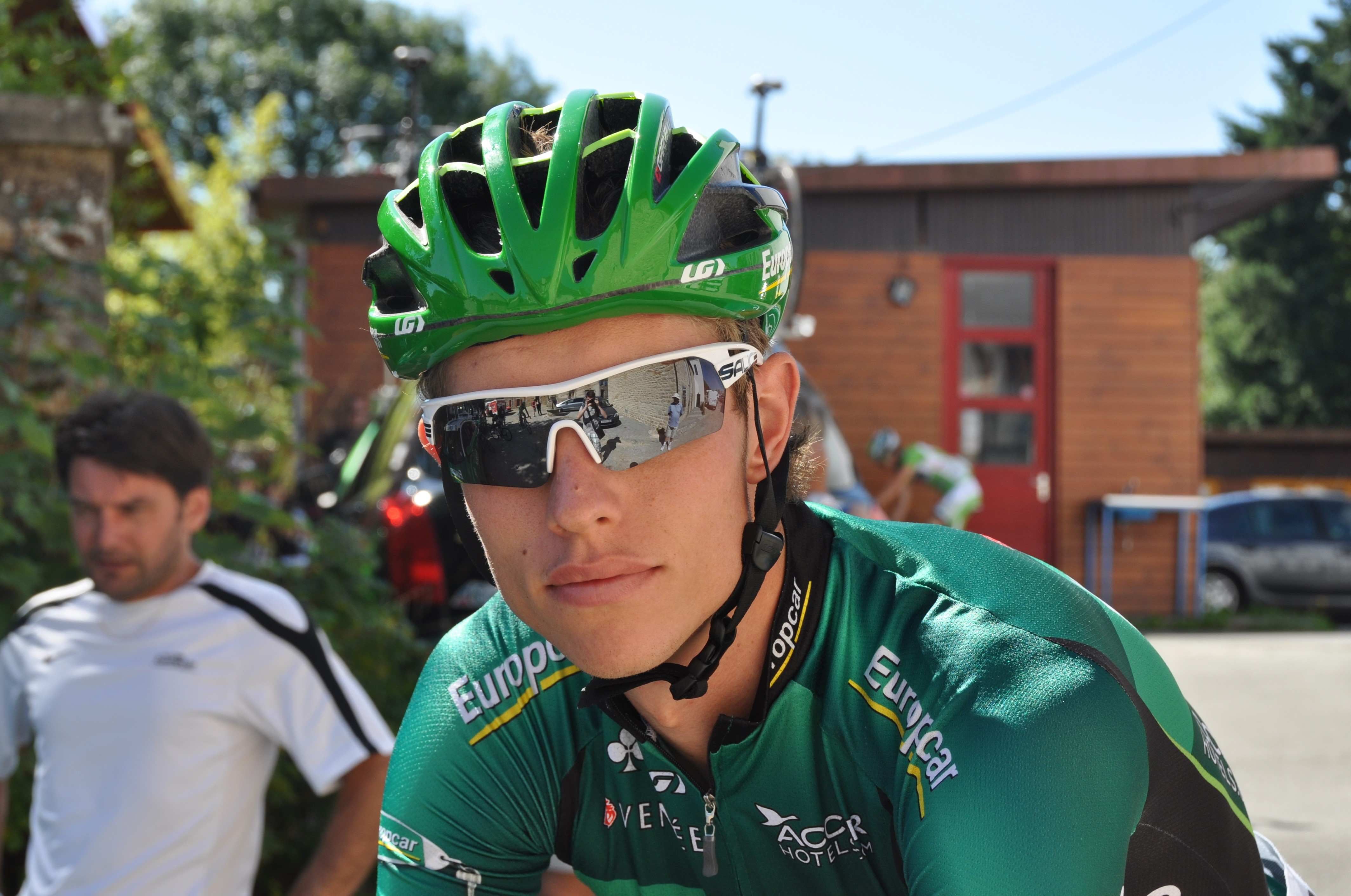 Björn Thurau au départ de la 2e étape de la Mi-août en Bretagne 2012 à Pont-Scorff